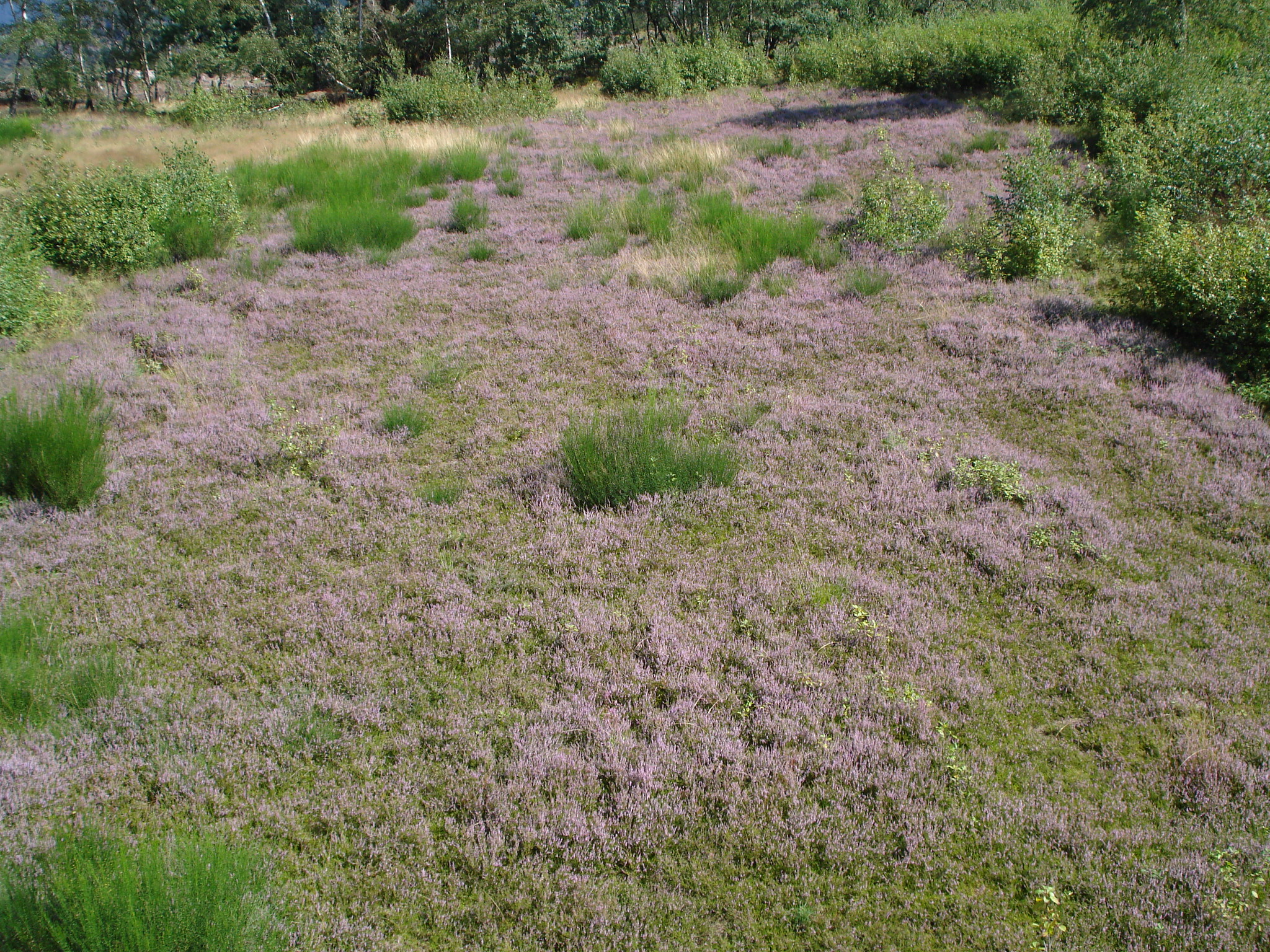 Maschinell geplaggte Fläche im Naturschutzgebiet „Wacholdervorkommen Gräfenberg“, dominierend ist die Besenheide